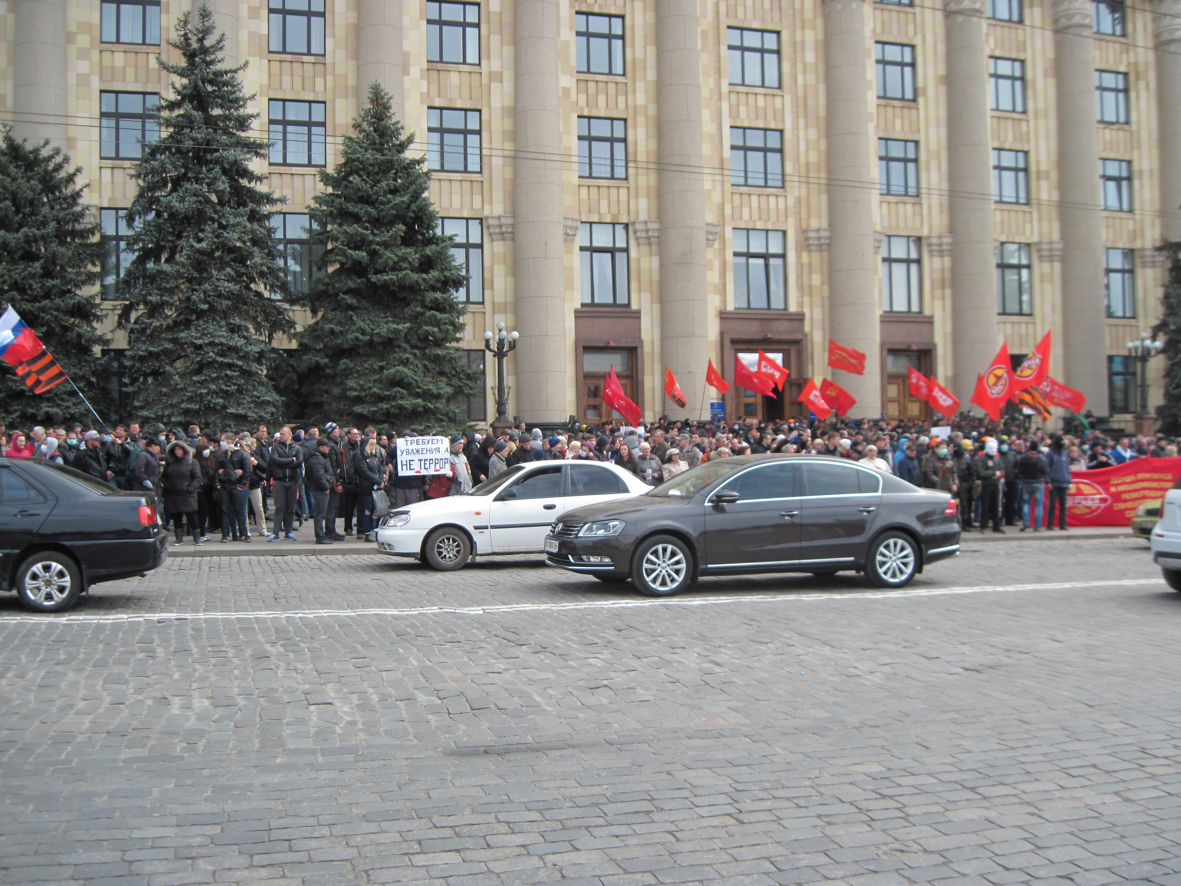 Захвачена російськими найманцями і проросійськи громадянами України Харківська ОДА. 7 квітня 2014